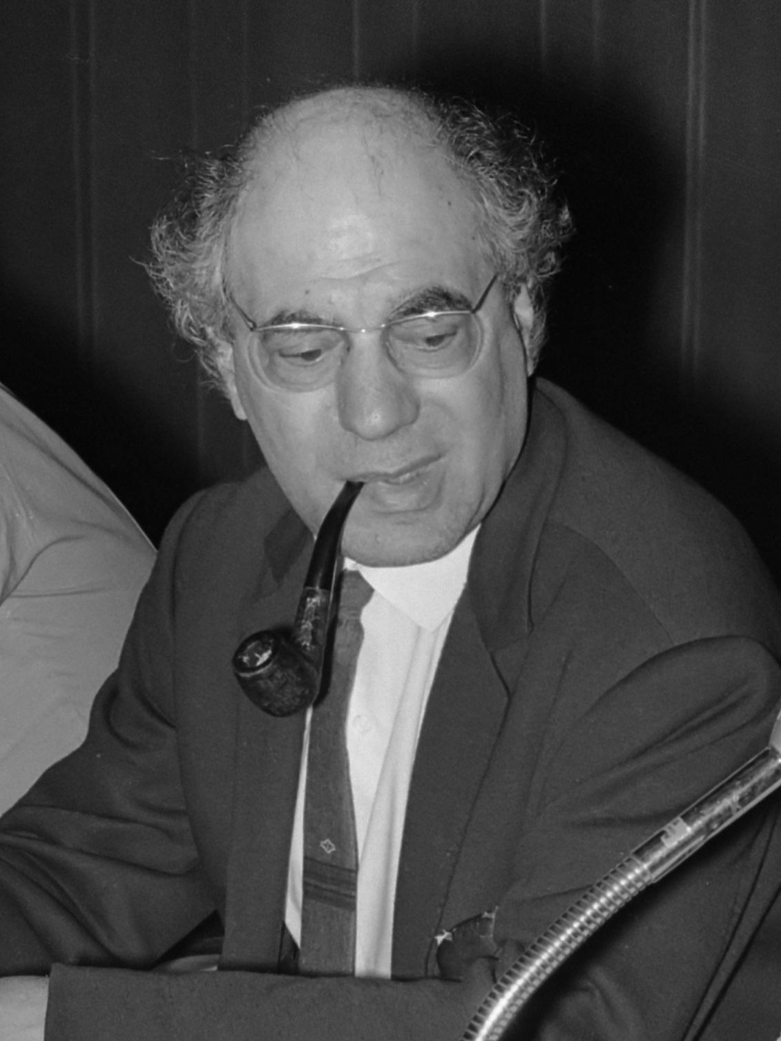 "Midden-Oosten "Congres van ASVA in Krasnapolsky, Amsterdam; v.l.n.r. Bertus Hendrikse, prof. Maxime Rodinson (docent), ex-ASVA-voorzitter